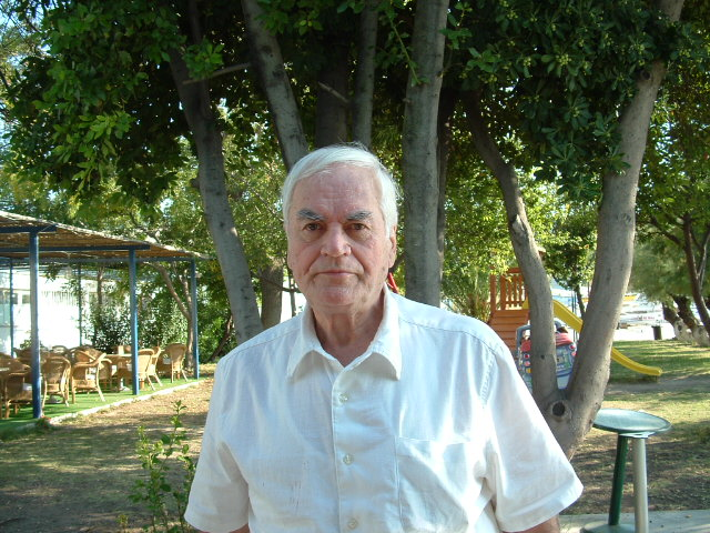 Frane Fingušt, enigmat